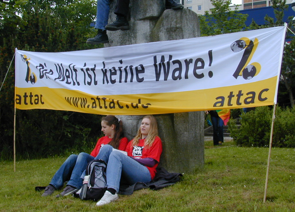 Die Welt ist keine Ware